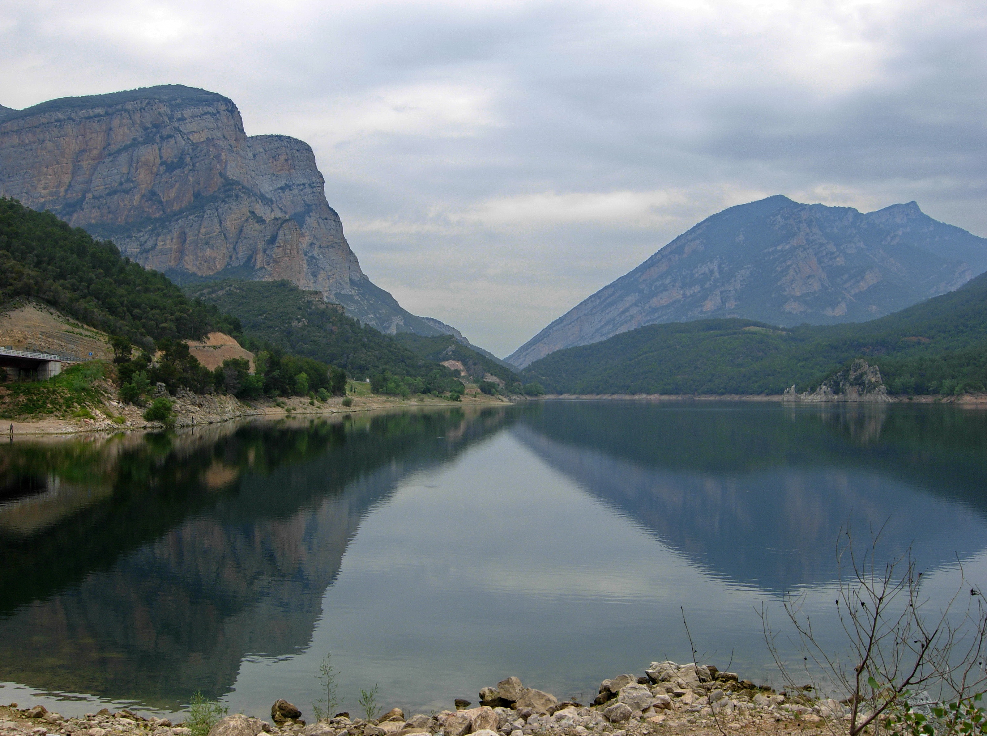 Pantà d'Oliana.